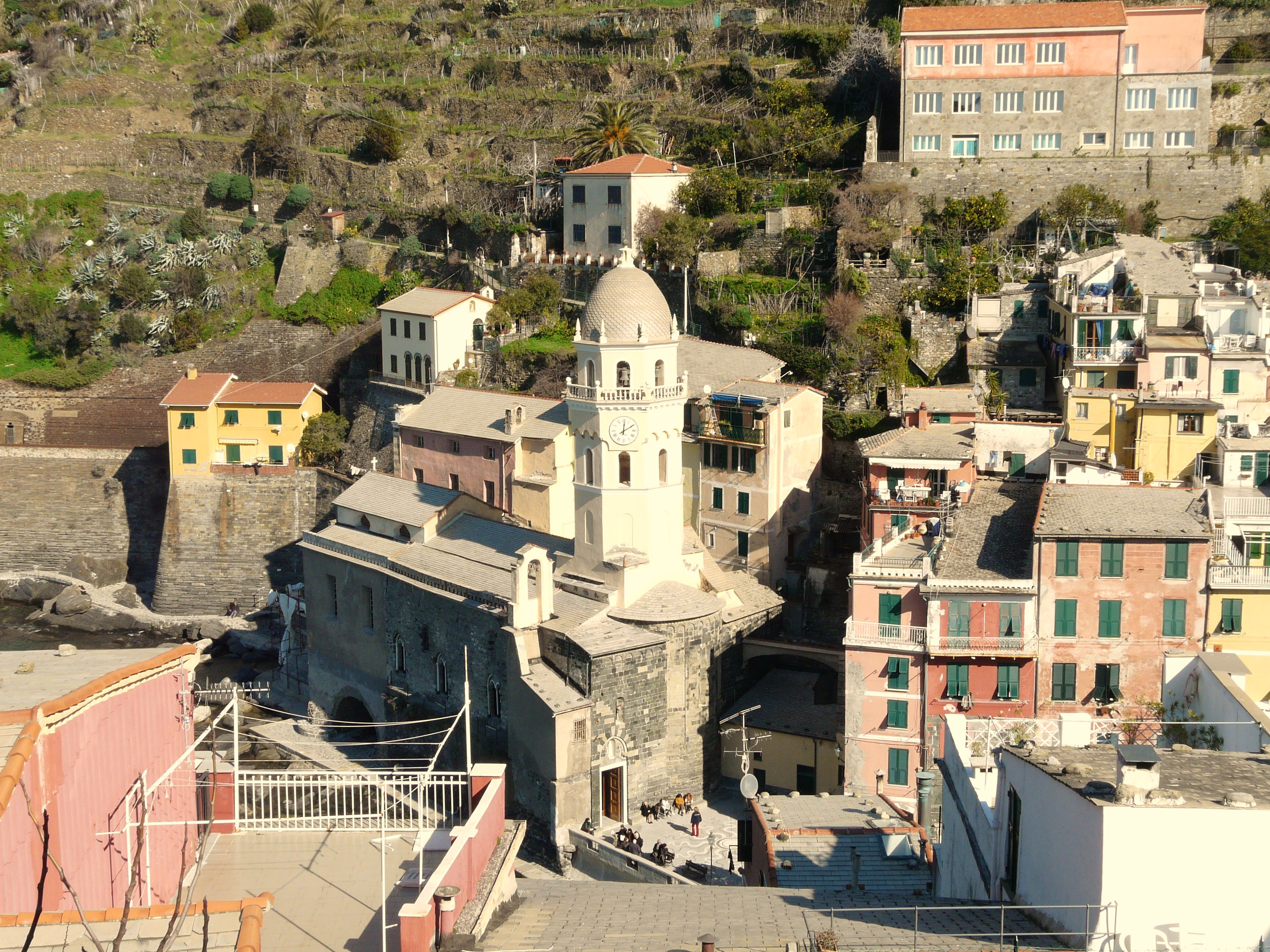 Chiesa di Santa Margherita, Vernazza, Cinque Terre, La Spezia, Liguria, Italia